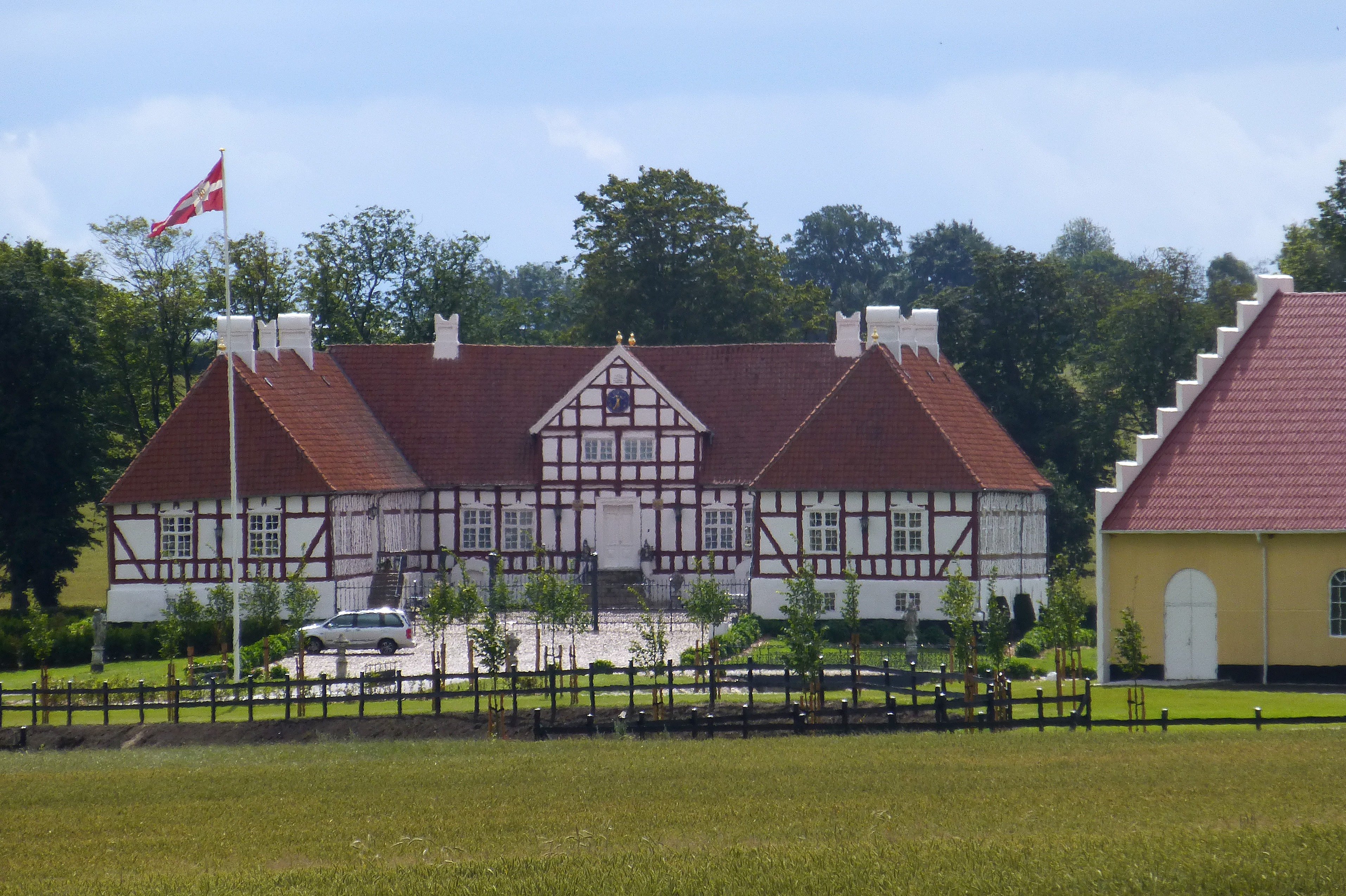 Åkær set fra nordvest - Åkær er en herregård, der kendes tilbage til begyndelsen af 1300-tallet. Den blev 1548 hovedsæde i et len der omfattede Hads Herred, og i 1660 blev det omdannet til Åkær Amt.